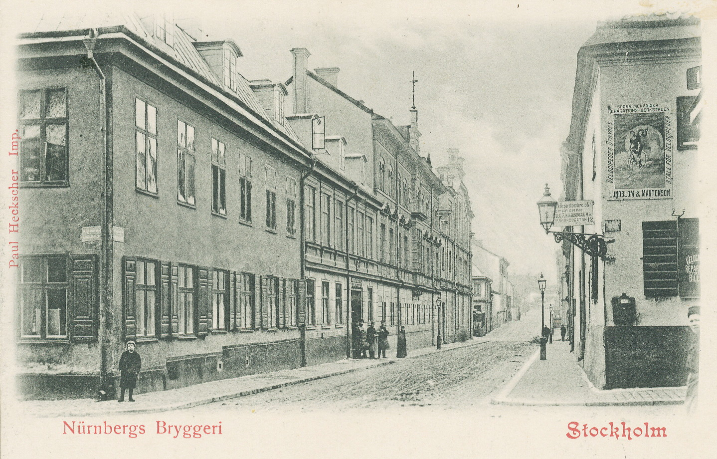 Nürnbergs bryggeri, byggnaderna i Dykärret mindre 10